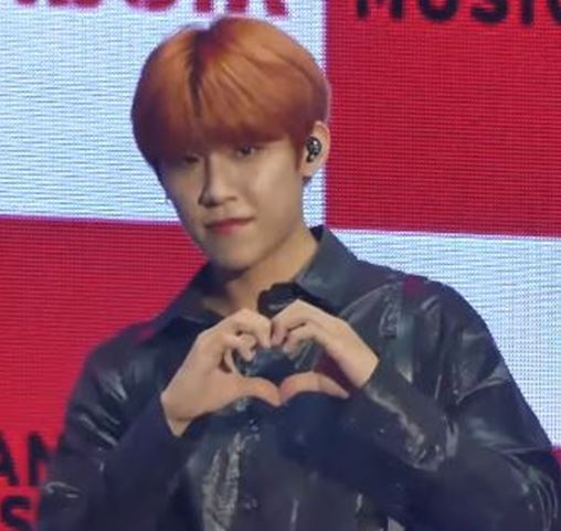 22일 서울시 송파구 방이동 올림픽공원 올림픽홀에서 보이그룹 AB6IX(임영민X김동현X이대휘X박우진X전웅)의 데뷔앨범 ‘B:COMPLETE’ 발매 기념 쇼케이스가 열려 개별 포토타임을 갖고 있다.